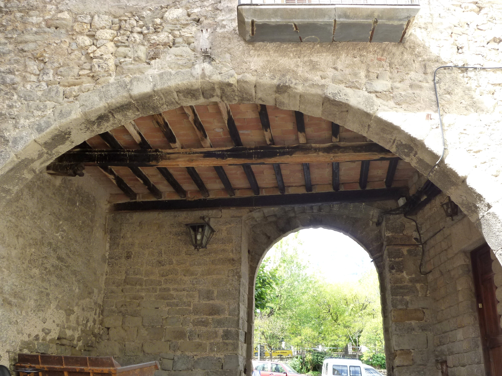 Recinte murat de la vila (Sant Llorenç de Morunys): Portal de la Canal, al nord, atocar de l'església)